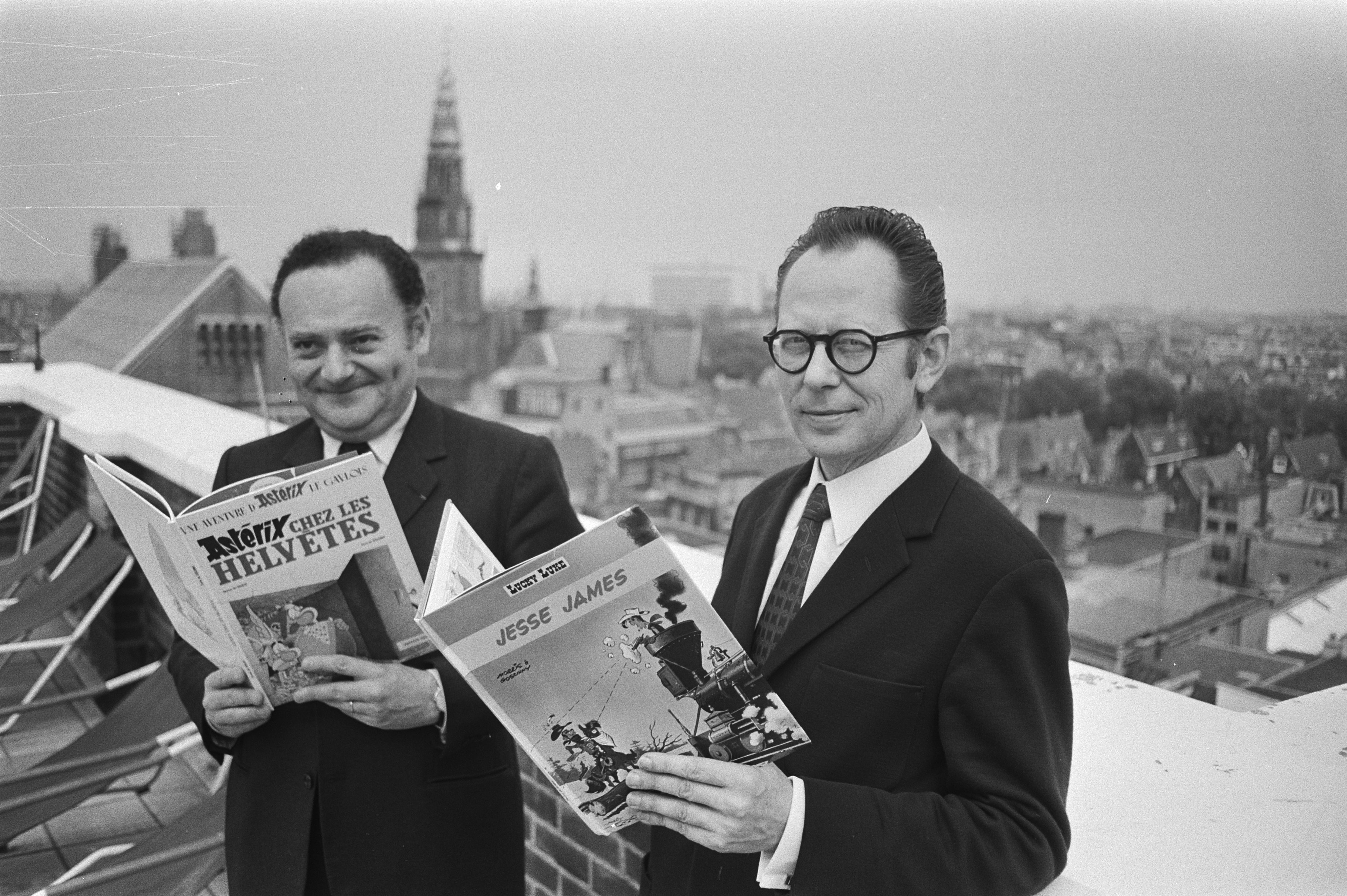 Los creadores de Lucky Luke, de izquierda a derecha René Goscinny (guionista del personaje, así como también de Astérix el galo) y Morris (dibujante de la serie). Amsterdam